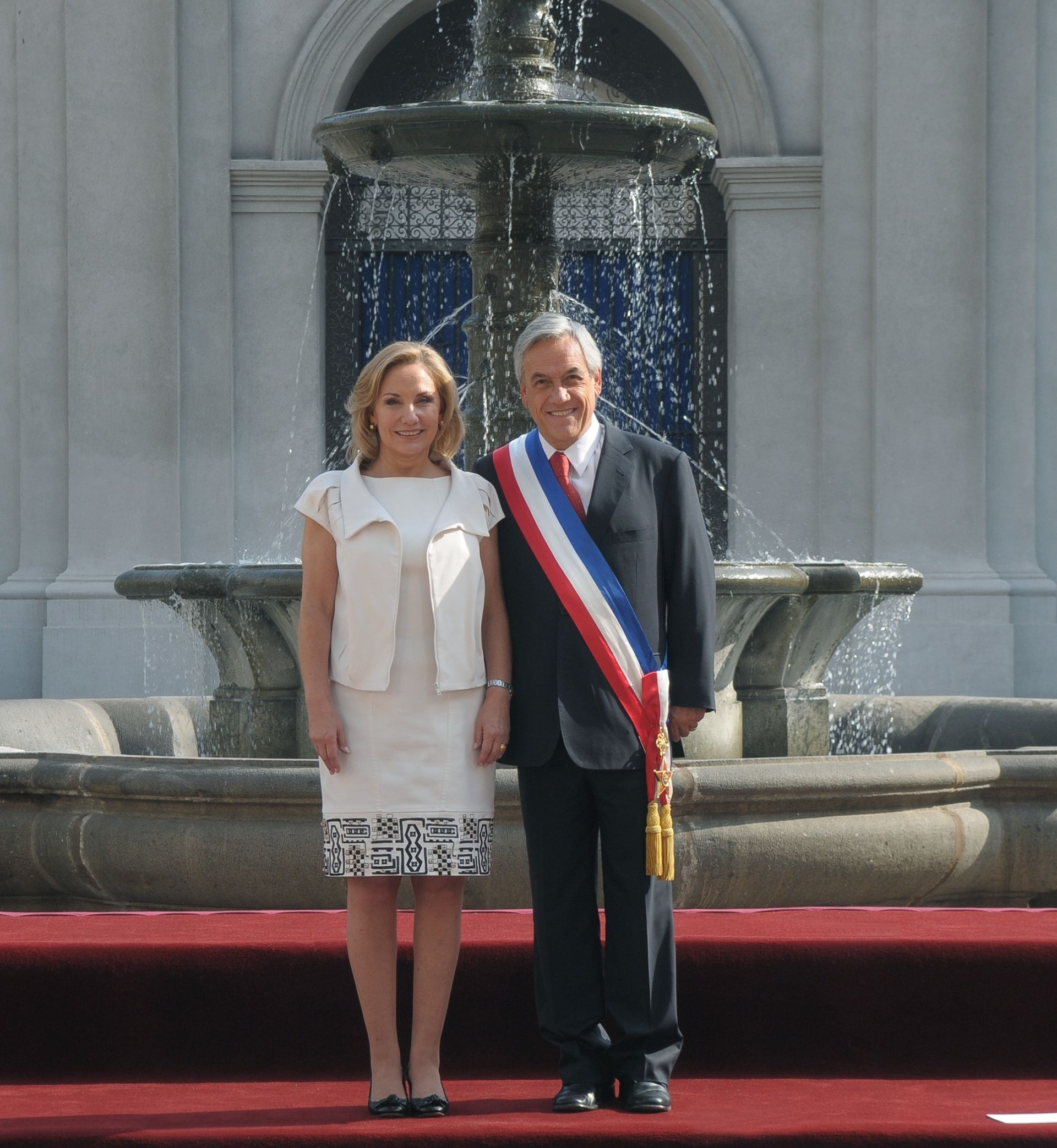 El Presidente de Chile Sebastián Piñera, junto a su esposa Cecilia Morel. Postales de los 100 primeros días de Gobierno.